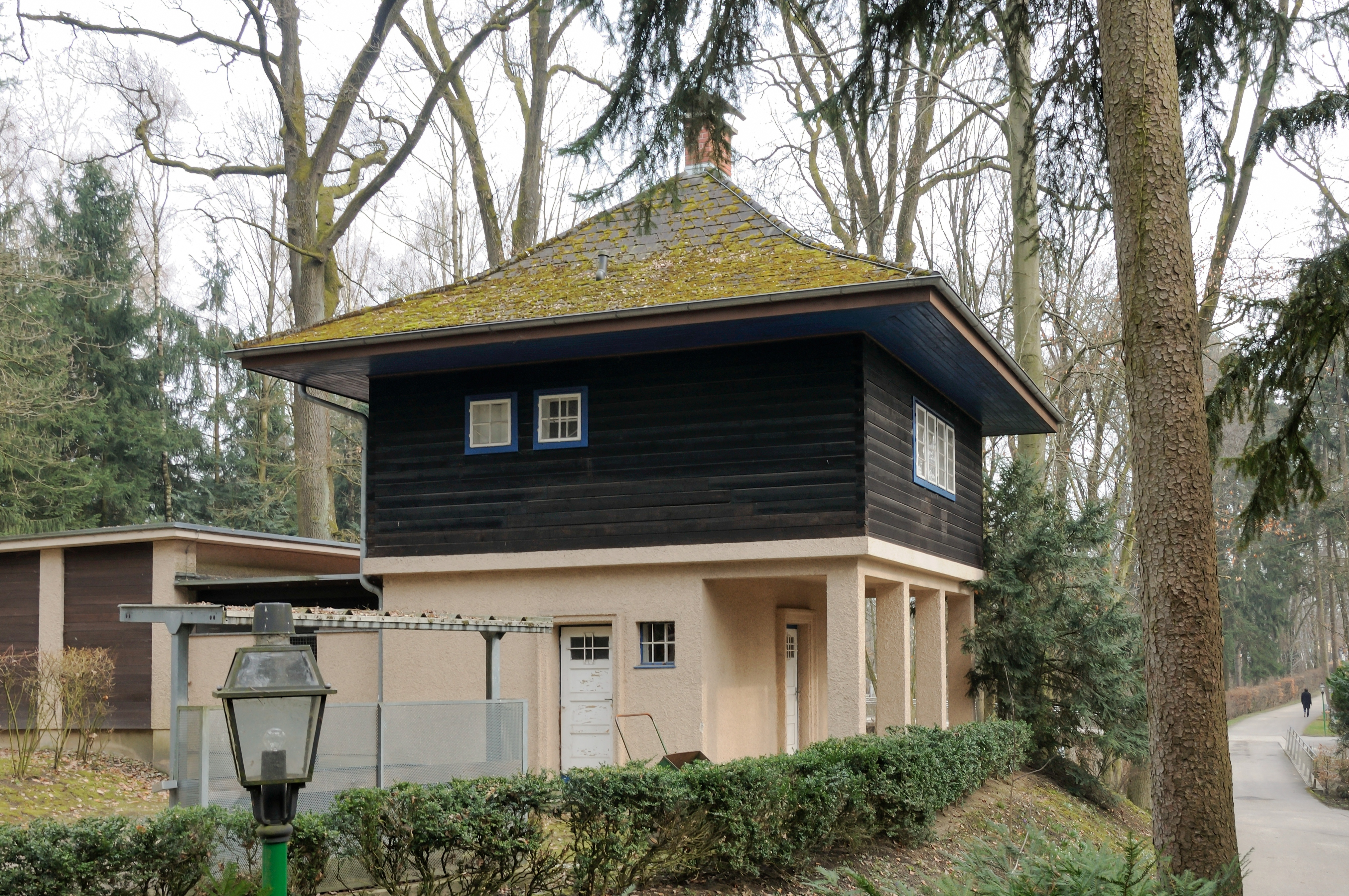 Bürgerhaus, Pförtnerhaus